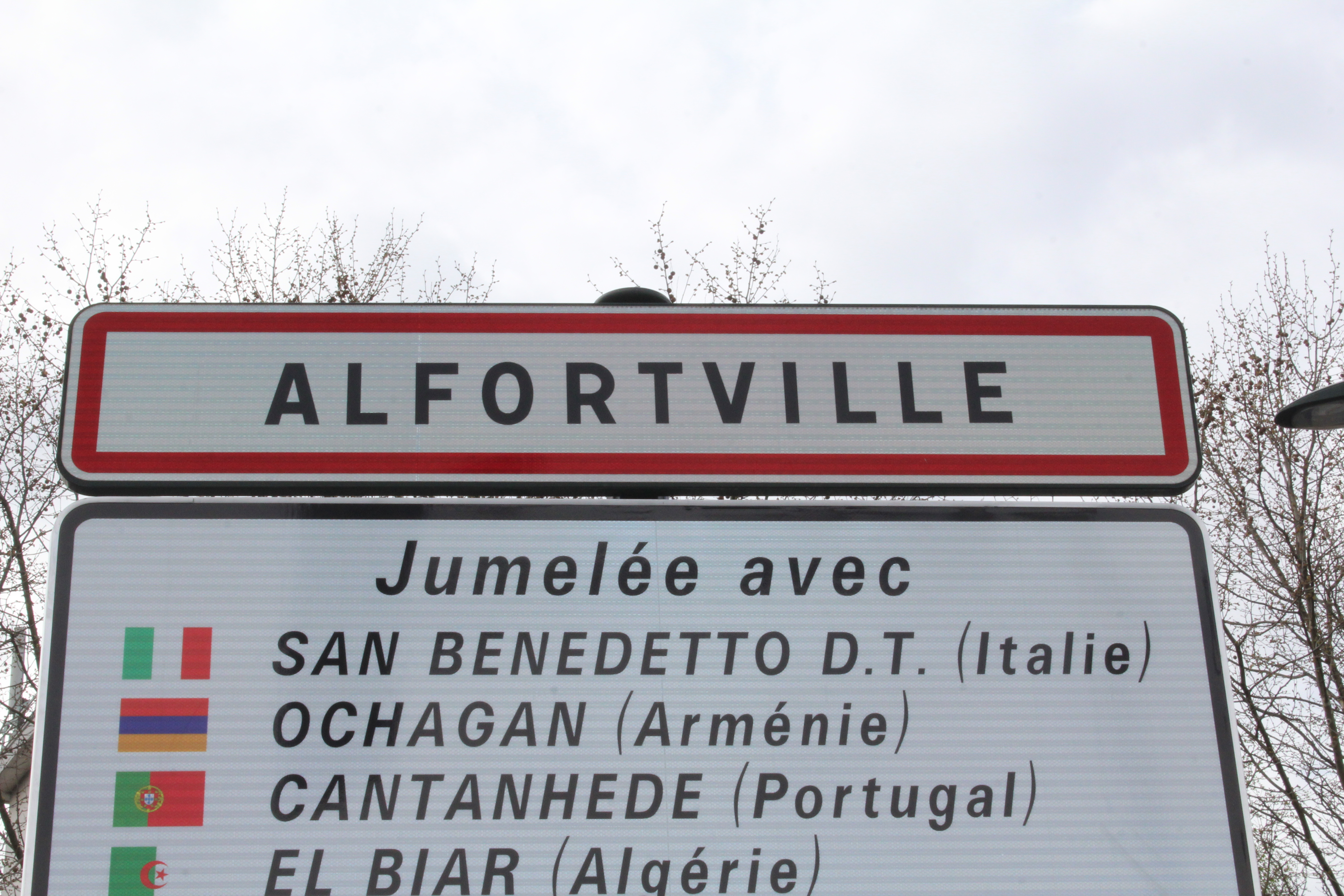 Panneau d'entrée dans Alfortville.